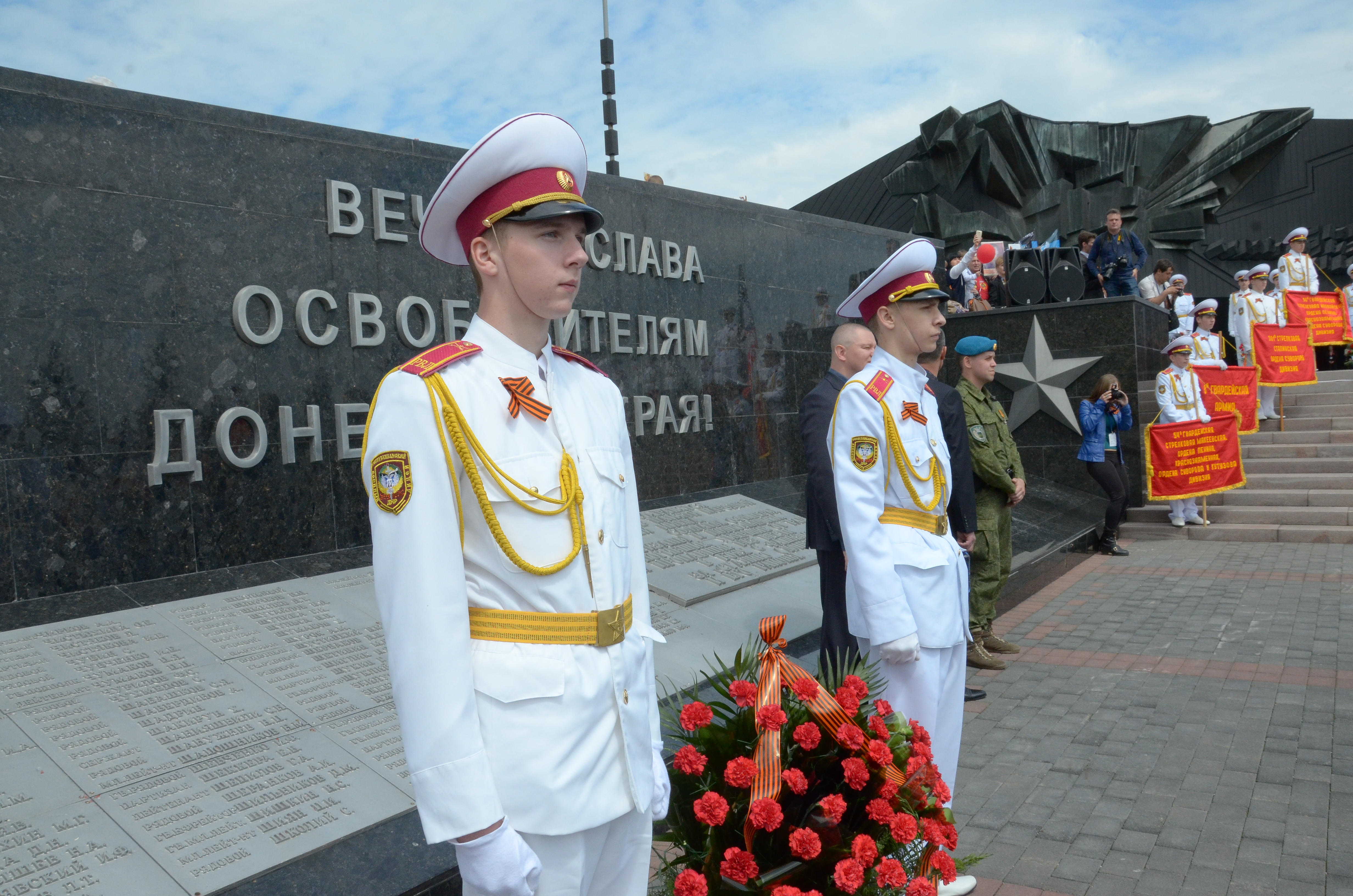 День Победы в Донецке